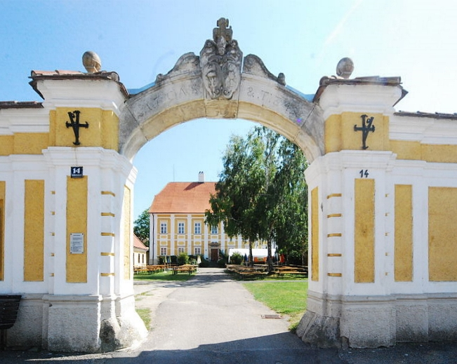 Pfarrhof von Zellerndorf in Niederösterreich - Portal